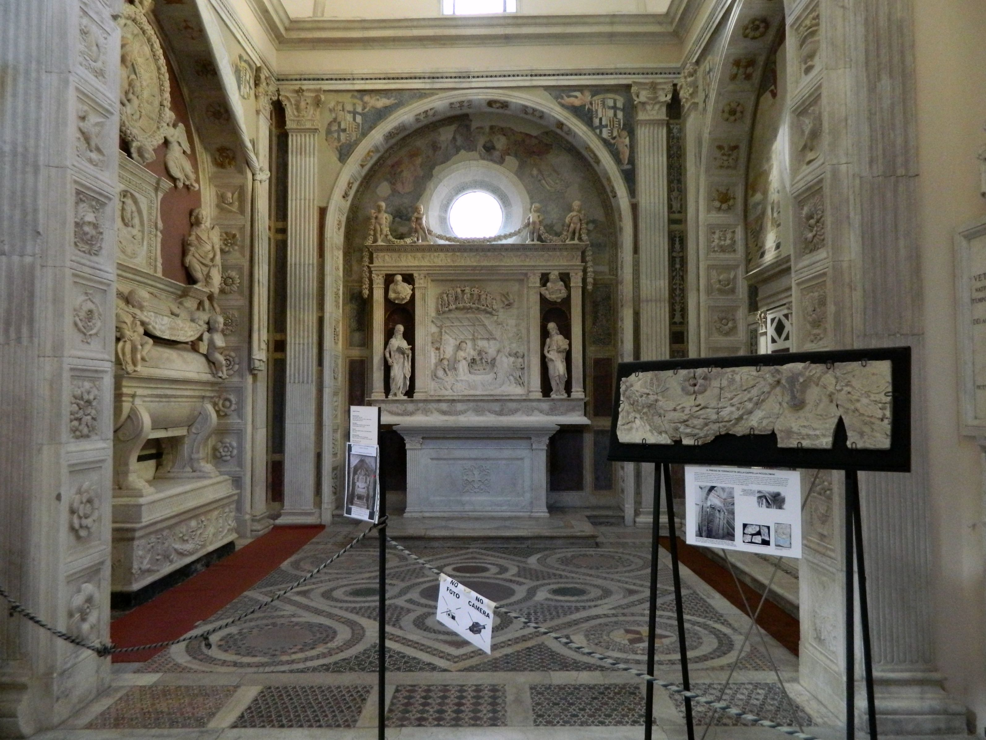 Chiesa di Sant'Anna dei Lombardi (Napoli) - Cappella Piccolomini (visuale della cappella)